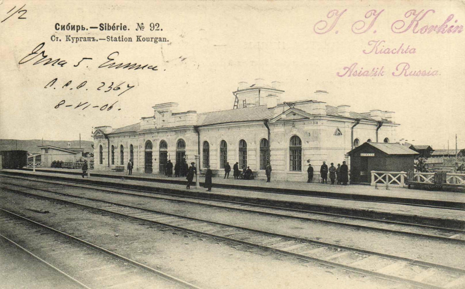 Сибирь. № 92. Ст. Курганъ